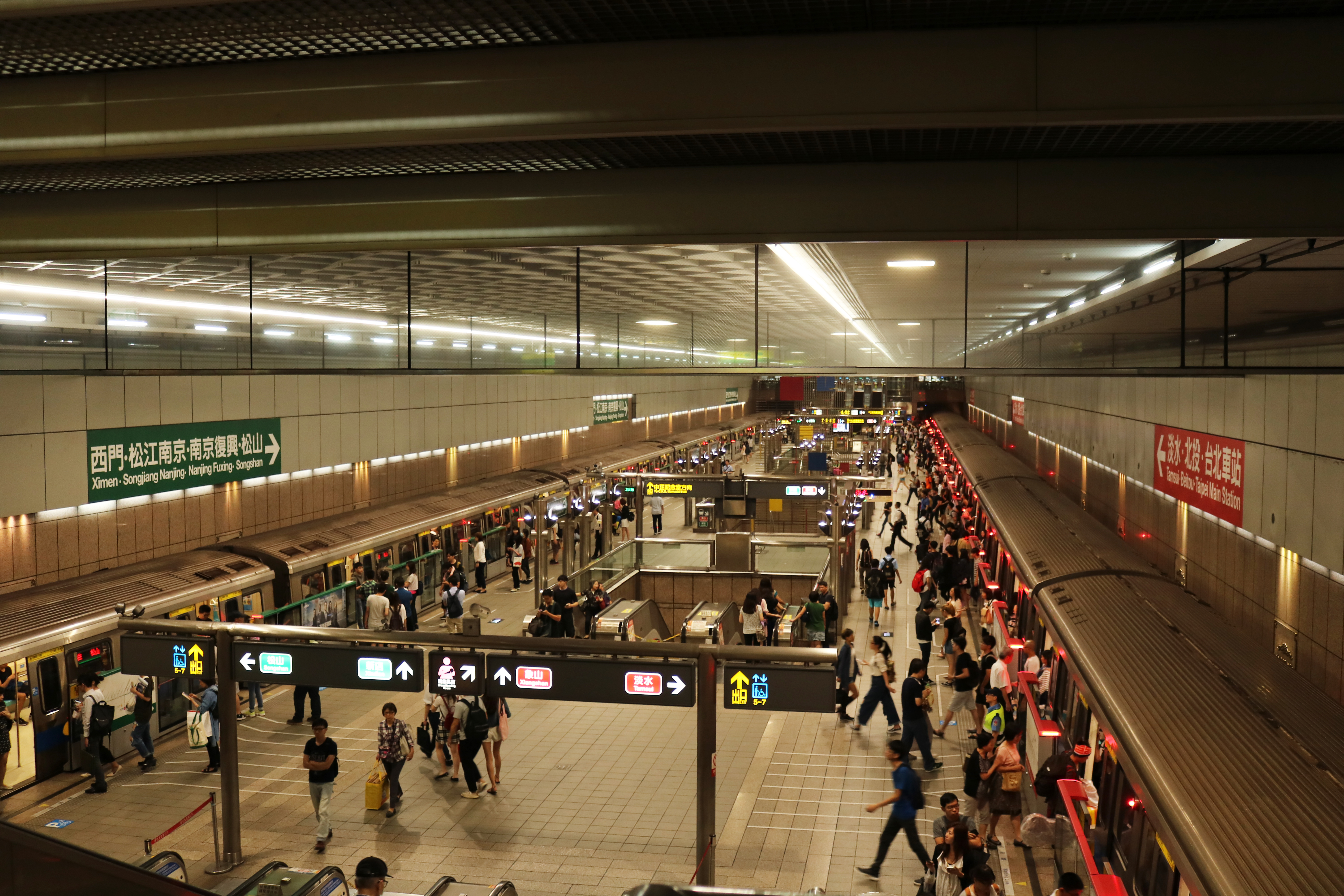 臺北捷運淡水信義線及松山新店線列車同時停靠中正紀念堂站地下二樓。